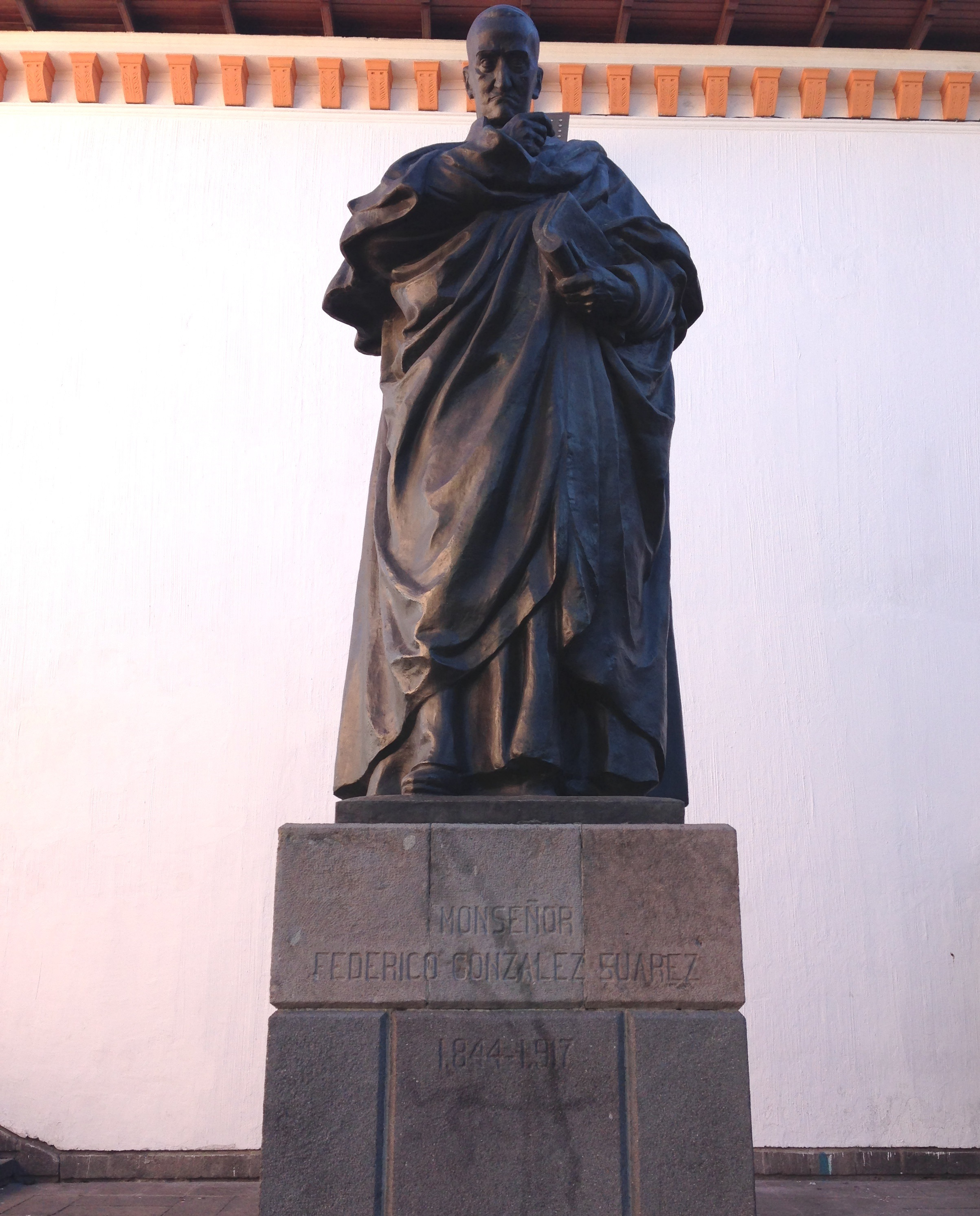 Monumento a Monseñor Federico Gonzalez Suárez en la Plaza Chica en el Centro Histórico de Quito